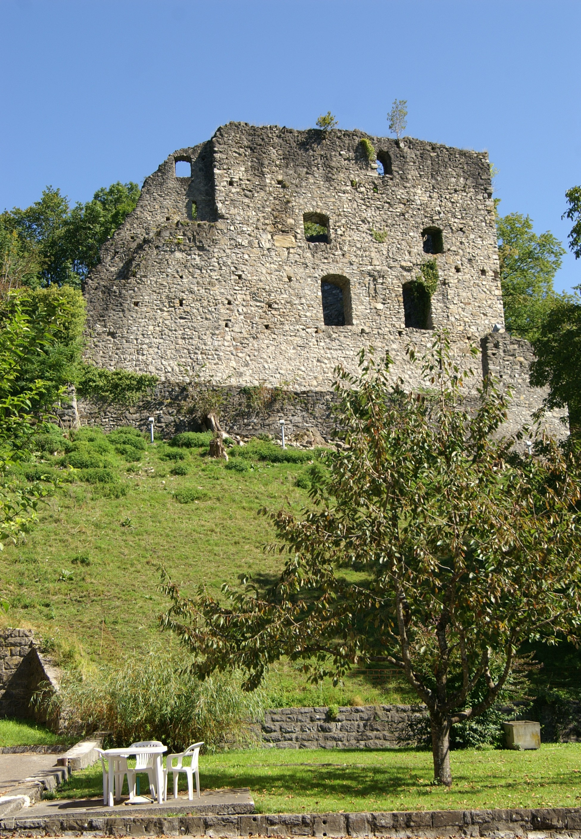 Burgruine Jagdberg, in Schlins, Vorarlberg. Veröffentlicht: Georg Kessler in "Freizeit im Ländle, Die schönsten Ausflugziele in Vorarlberg ISBN 978-3-7022-3068-5 2010.